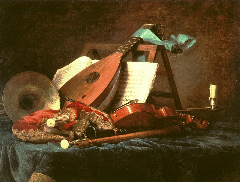 Joconde database: entry 000PE002804